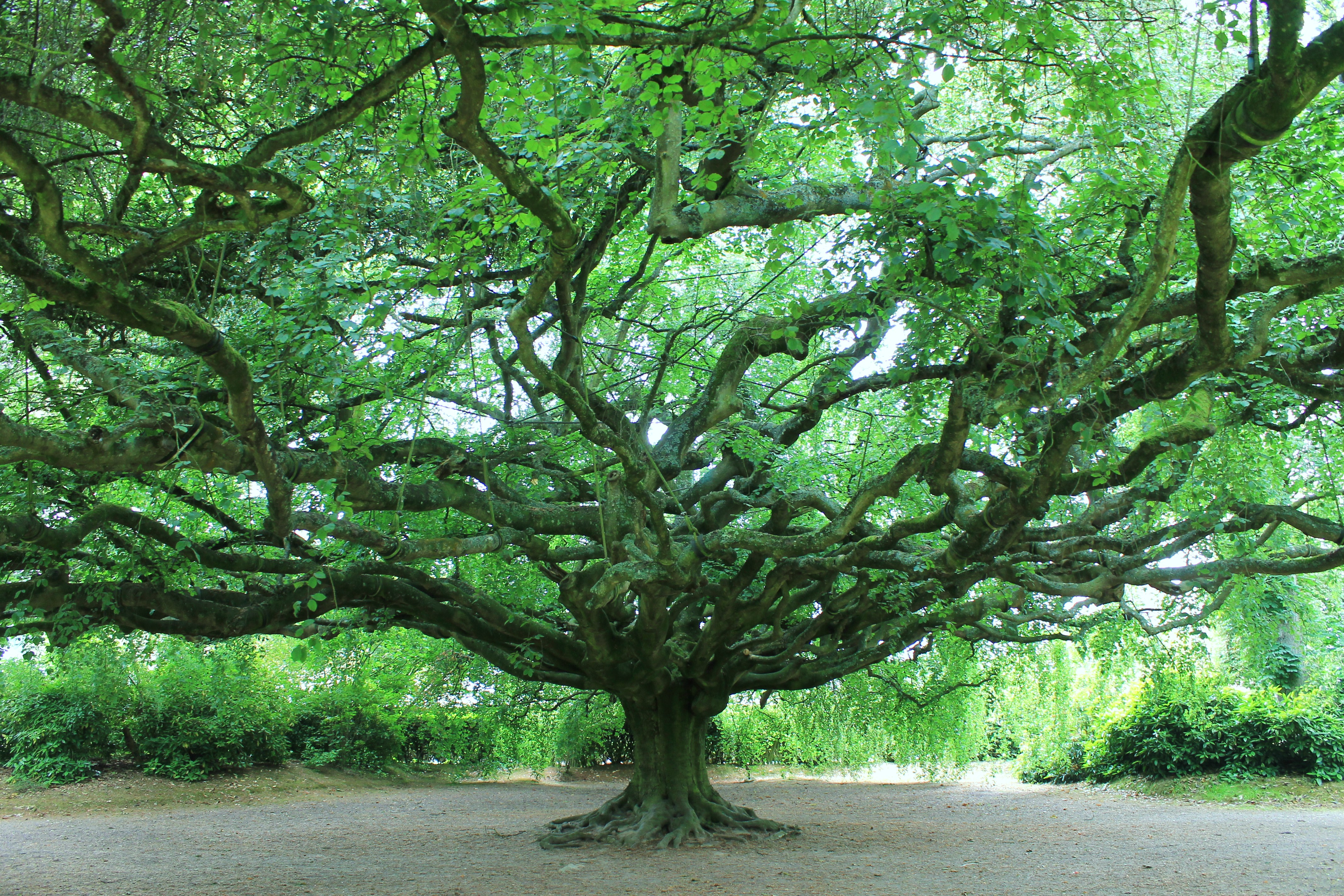 Hêtre pleureur tortillard classé monument naturel le 13 décembre 1932, label arbre remarquable de France en 2001, plantation estimé vers 1860, 40 mètres de diamètre dans le jardin botanique de Bayeux (Calvados)